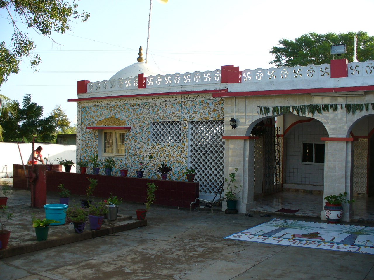 Hindu temple Shree Ram, Salamanga, Mozambique